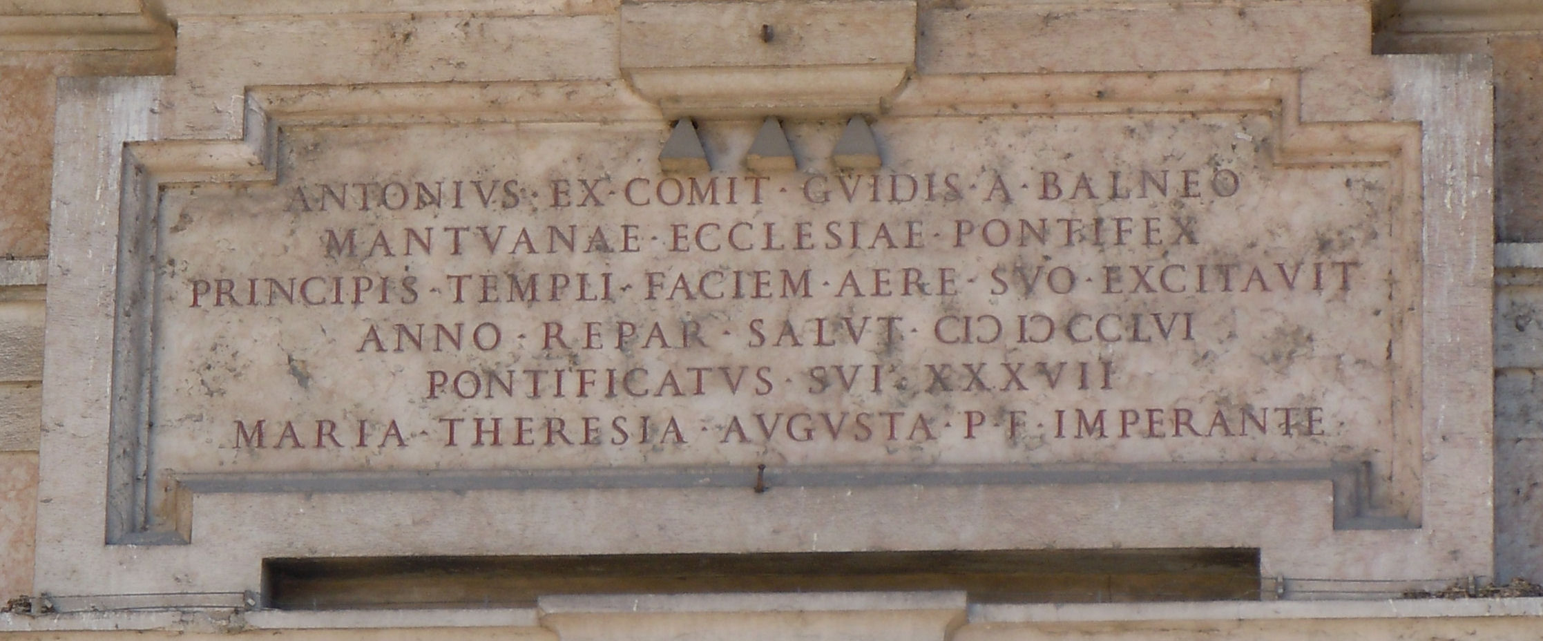 Lapide di Antonio Guidi di Bagno sul frontone del Duomo di Mantova.